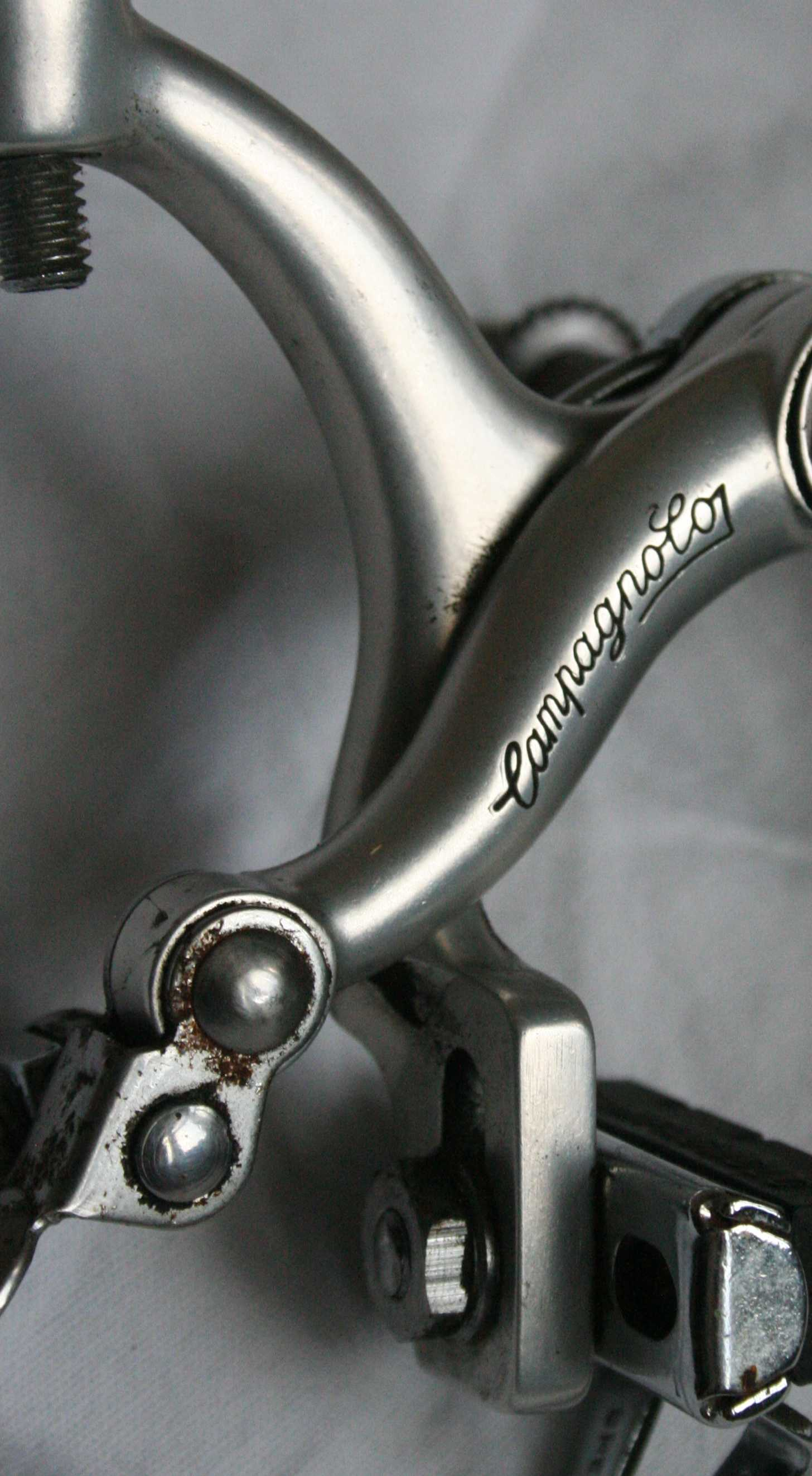 Campagnolo Break